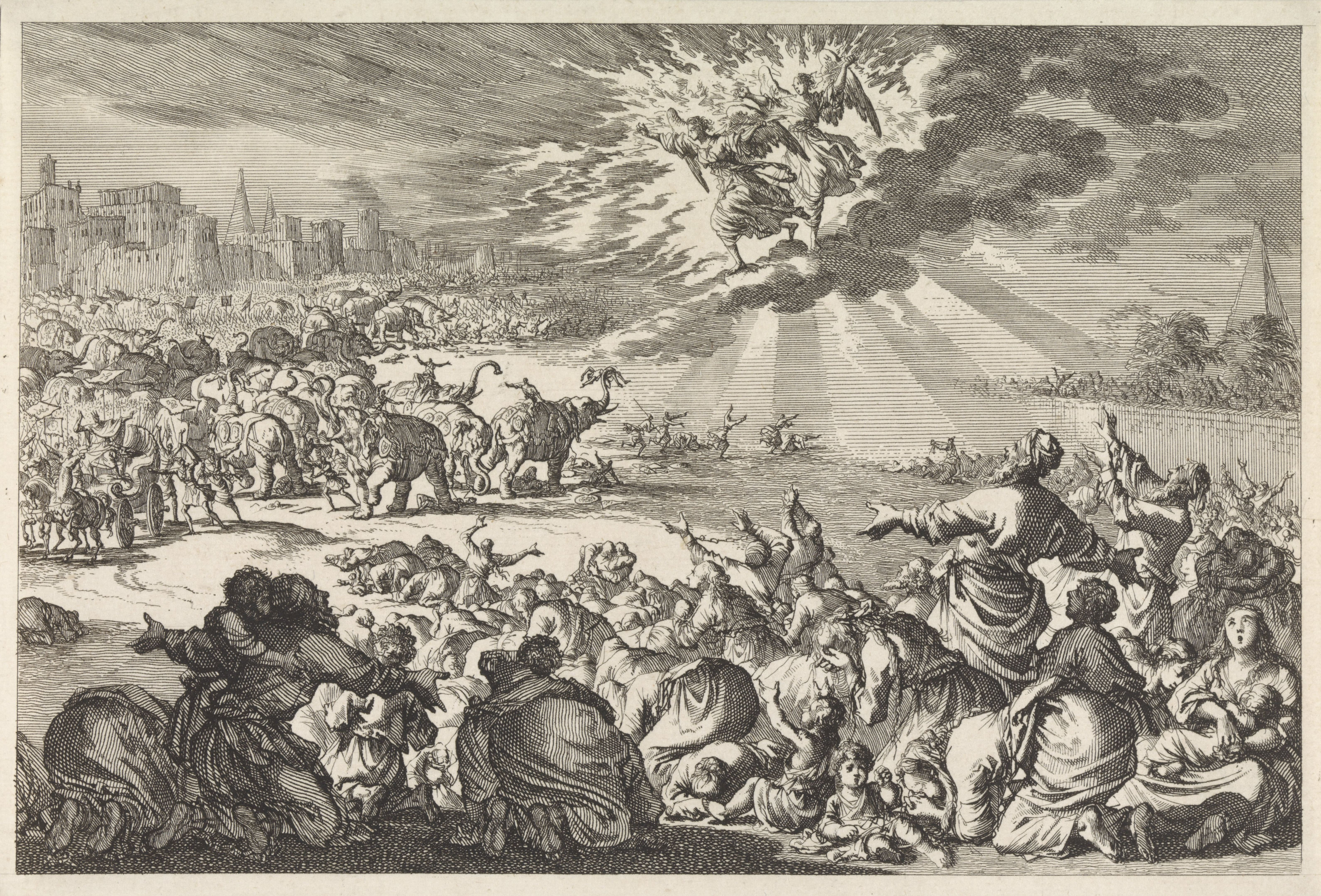 IdentificatieTitel(s): Twee engelen jagen de olifanten van Ptolemaeus Philopator wegObjecttype: prent Objectnummer: RP-P-OB-44.915Catalogusreferentie: Van Eeghen 26411(2)Opmerking: Twee staten bekendOpschriften / Merken: verzamelaarsmerk, verso midden onder, gestempeld: Lugt 2228Omschrijving: Twee engelen verschijnen aan de hemel en jagen de dronken olifanten van Ptolemaeus Philopator weg, die op het punt stonden de Joodse bevolking te vertrappelen. De joden knielen en bidden tot God uit dankbaarheid. Op de achtergrond wordt het leger van Ptolemaeus Philopator door de olifanten vertrapt.VervaardigingVervaardiger: prentmaker: Jan Luykenuitgever: Pieter Mortier (I)Plaats vervaardiging: AmsterdamDatering: 1700Fysieke kenmerken: ets; proefdrukMateriaal: papier Techniek: etsenAfmetingen: blad: h 145 mm × b 213 mmToelichtingProefdruk voor een boekillustratie voor David Martin. Historie des Ouden en Nieuwen Testaments, verrykt met meer dan vierhonderd printverbeeldingen. Amsterdam: Pieter Mortier, 1700.OnderwerpWat: King Ptolemy IV Philopator tries to have the Jews killed by drunken elephants; the Jews pray and are saved by two angels (3 Maccabees 5)Verwerving en rechtenVerwerving: onbekendCopyright: Publiek domein